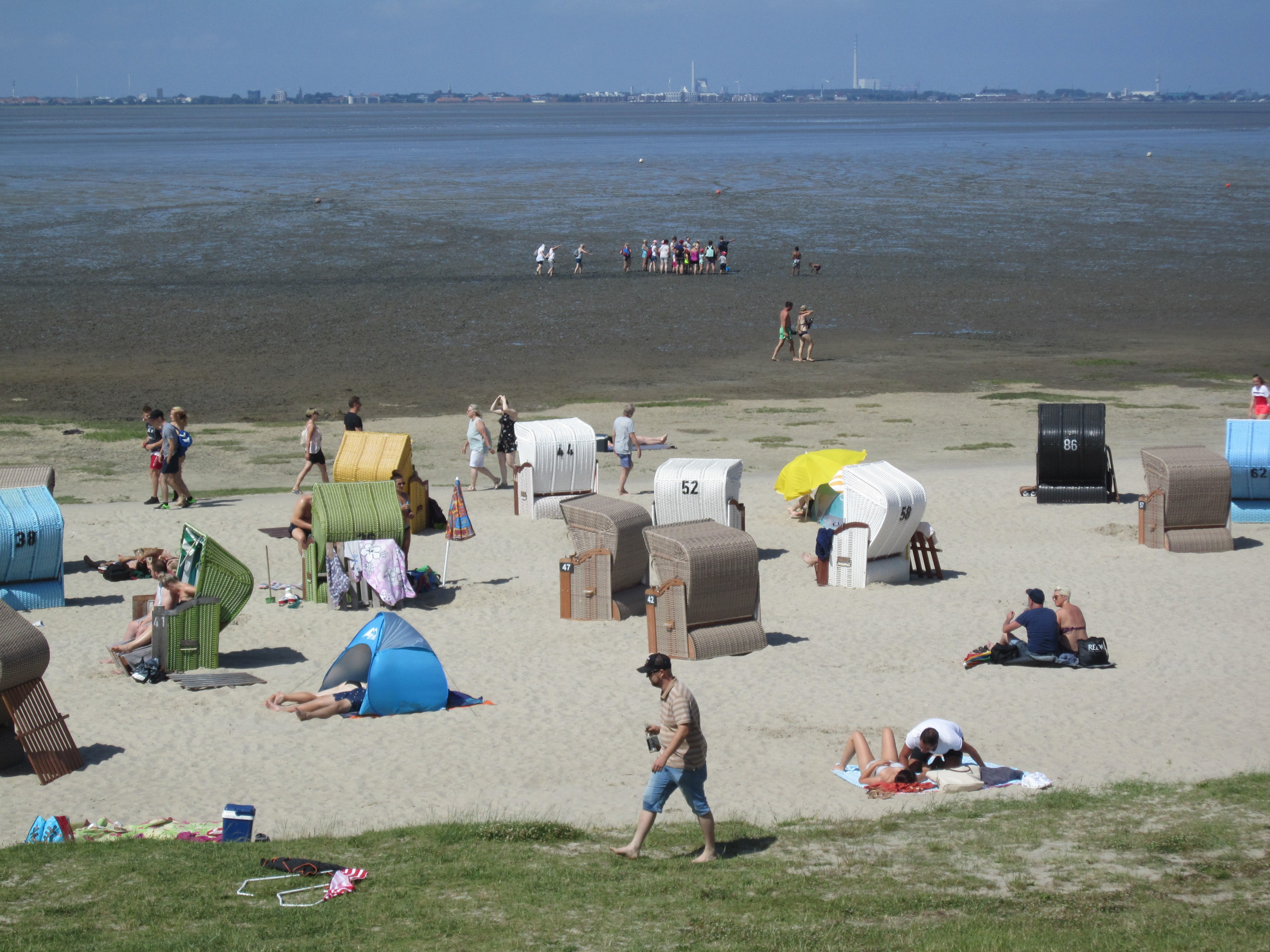 Blick vom Deich in Dangast über den Nordstrand, über eine Gruppe Wattwanderer und den Jadebusen bei ablaufendem Wasser nach Wilhelmshaven